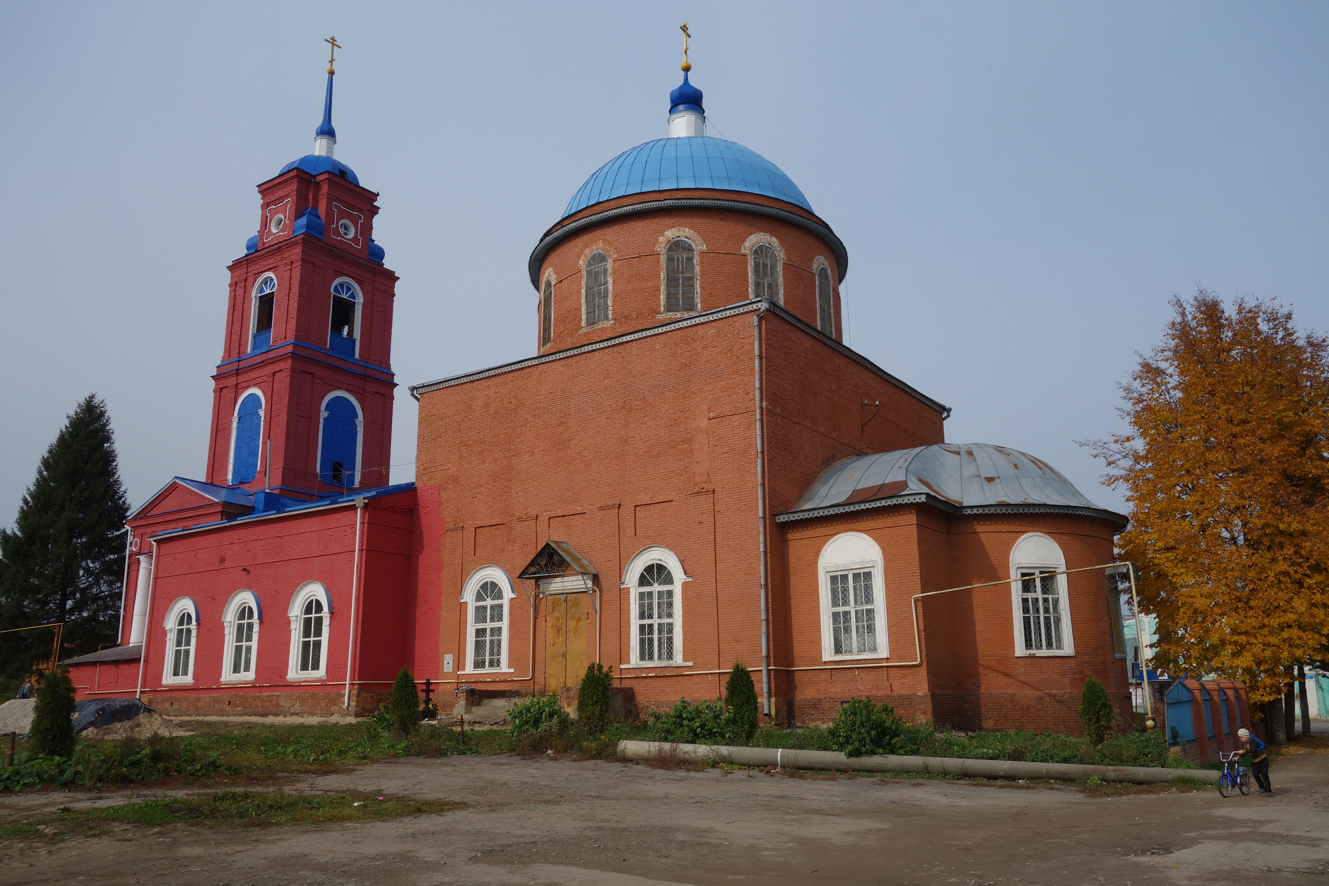 Троицкая церковь с интерьером: улица Карла Маркса, Одоев, Одоевский район, Тульская область